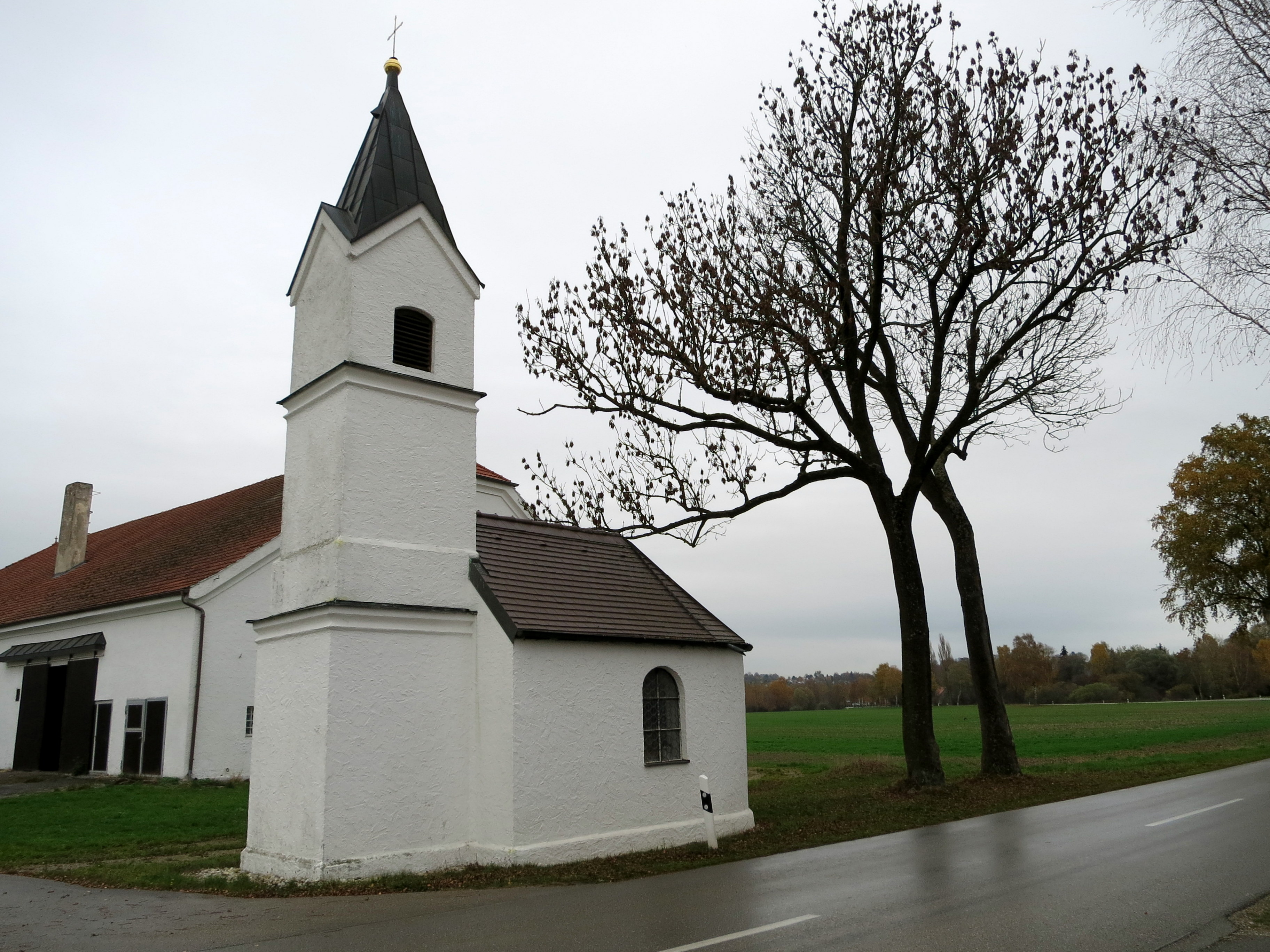 Dorfkapelle